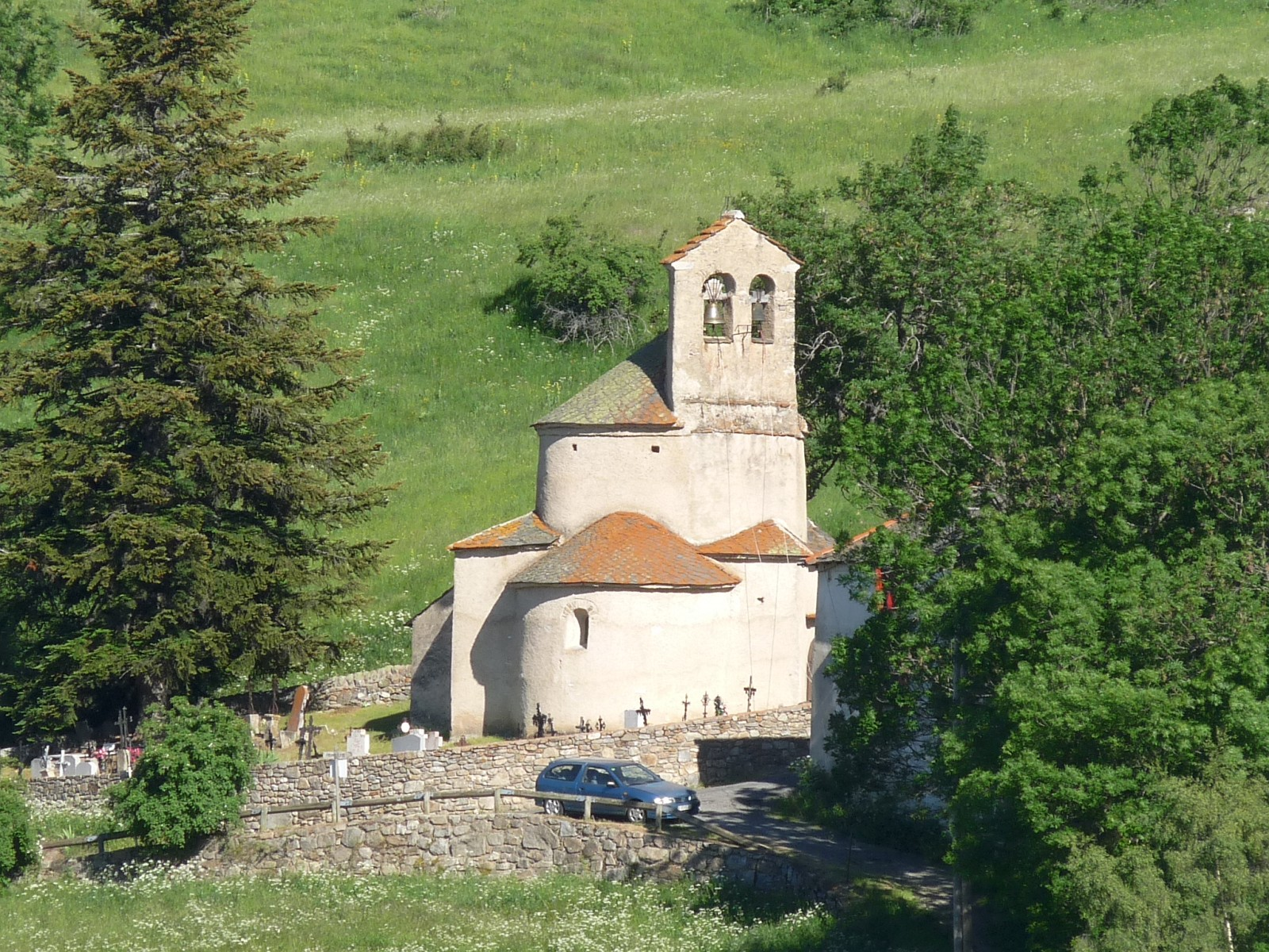 Eglise de Planès, Pyrénées-Orientales, France